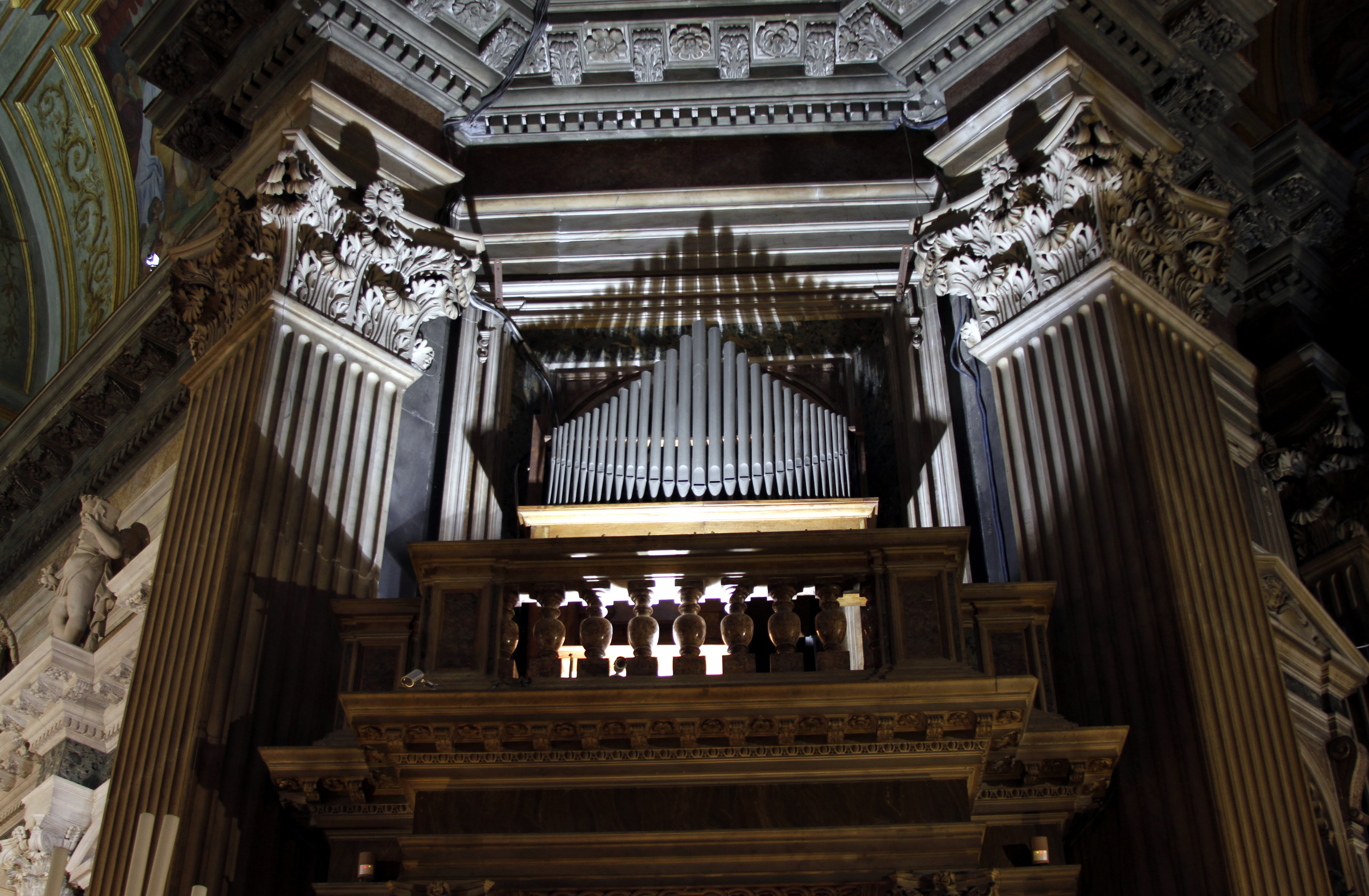 Cappella di San Gennaro, Catedral de Nápoles